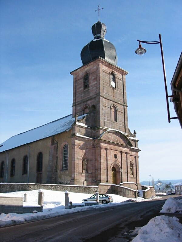 L'église de Bertrimoutier (Vosges) Photo personnelle, prise le 2 mars 2005. Christian Amet (Cham)